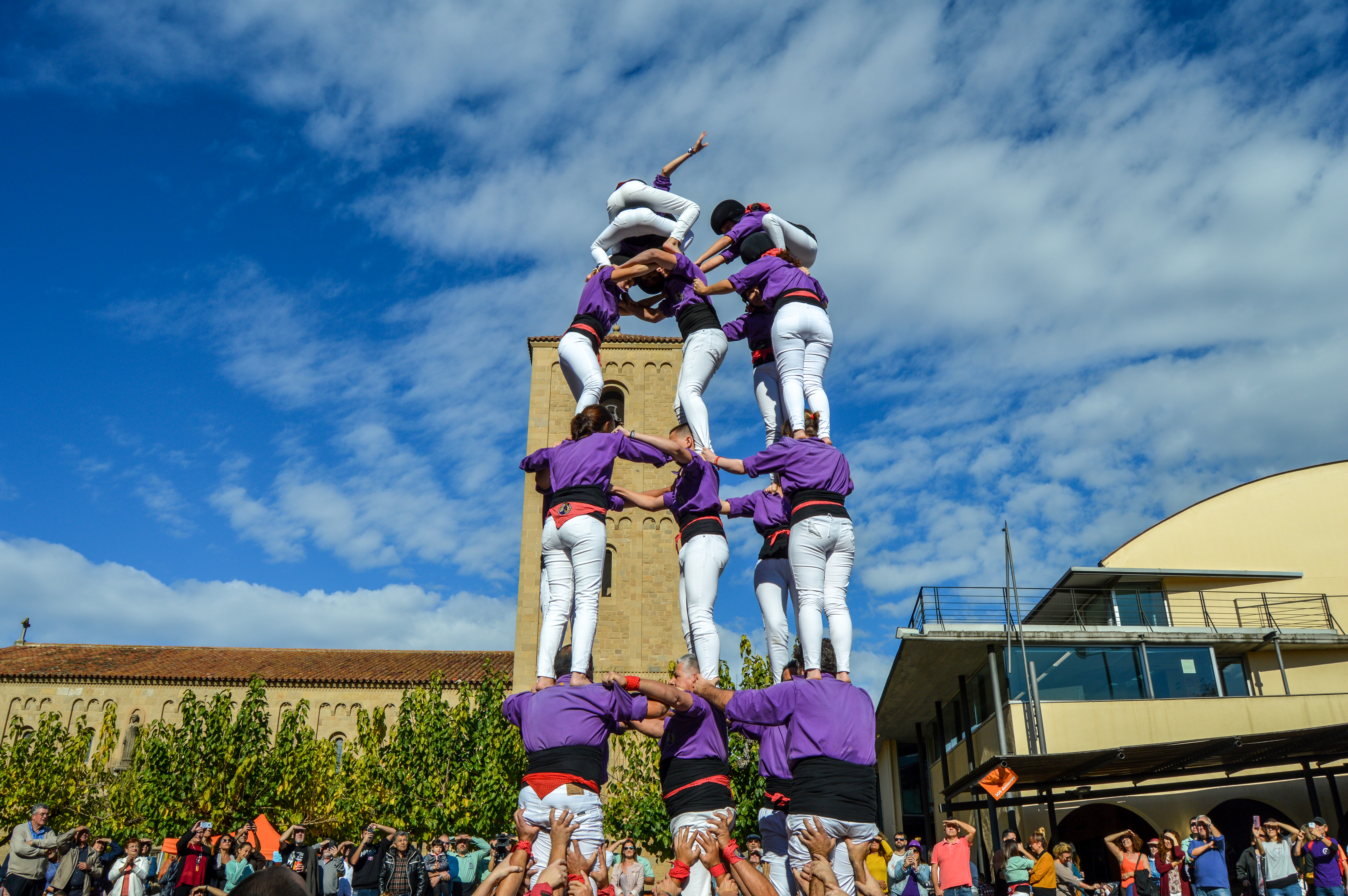 1r Castell 5d6 de la història dels Manyacs de Parets 05/11/2017 Plaça de la Vila de Parets